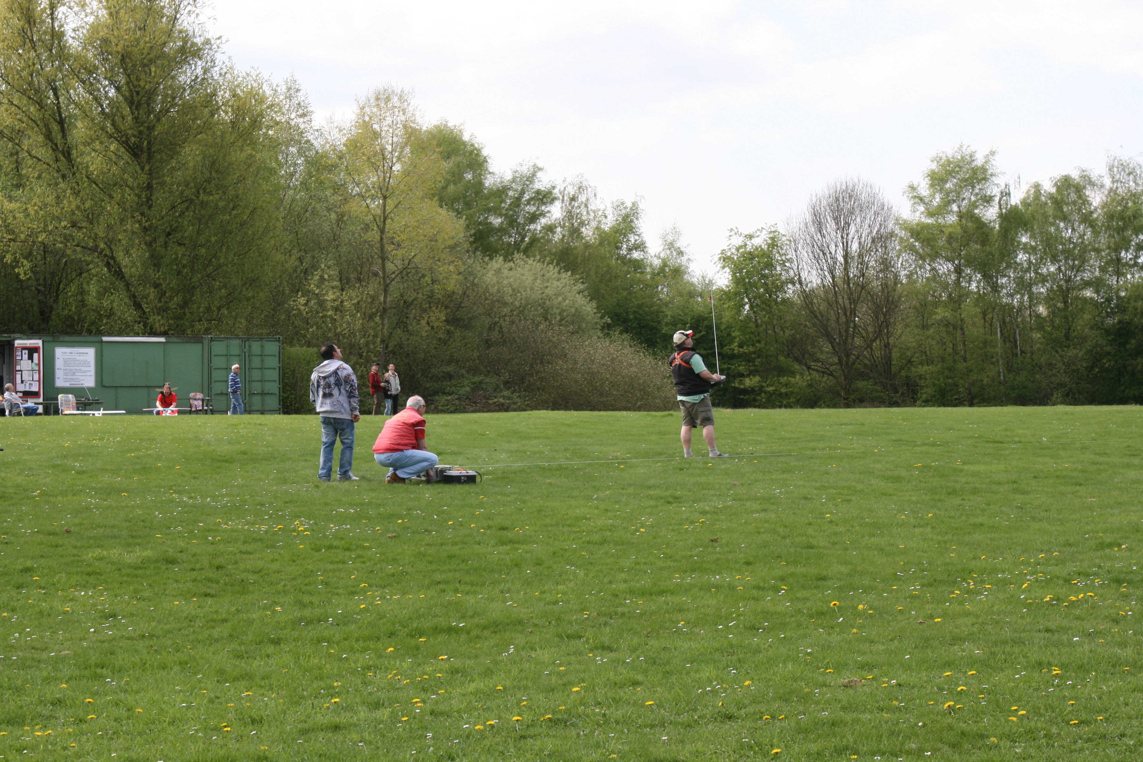 Modellflugplatz Königsgrube auf der Königsgruber Halde. Die Grenze von Herne und Bochum verläuft quer durch den Flugplatz.